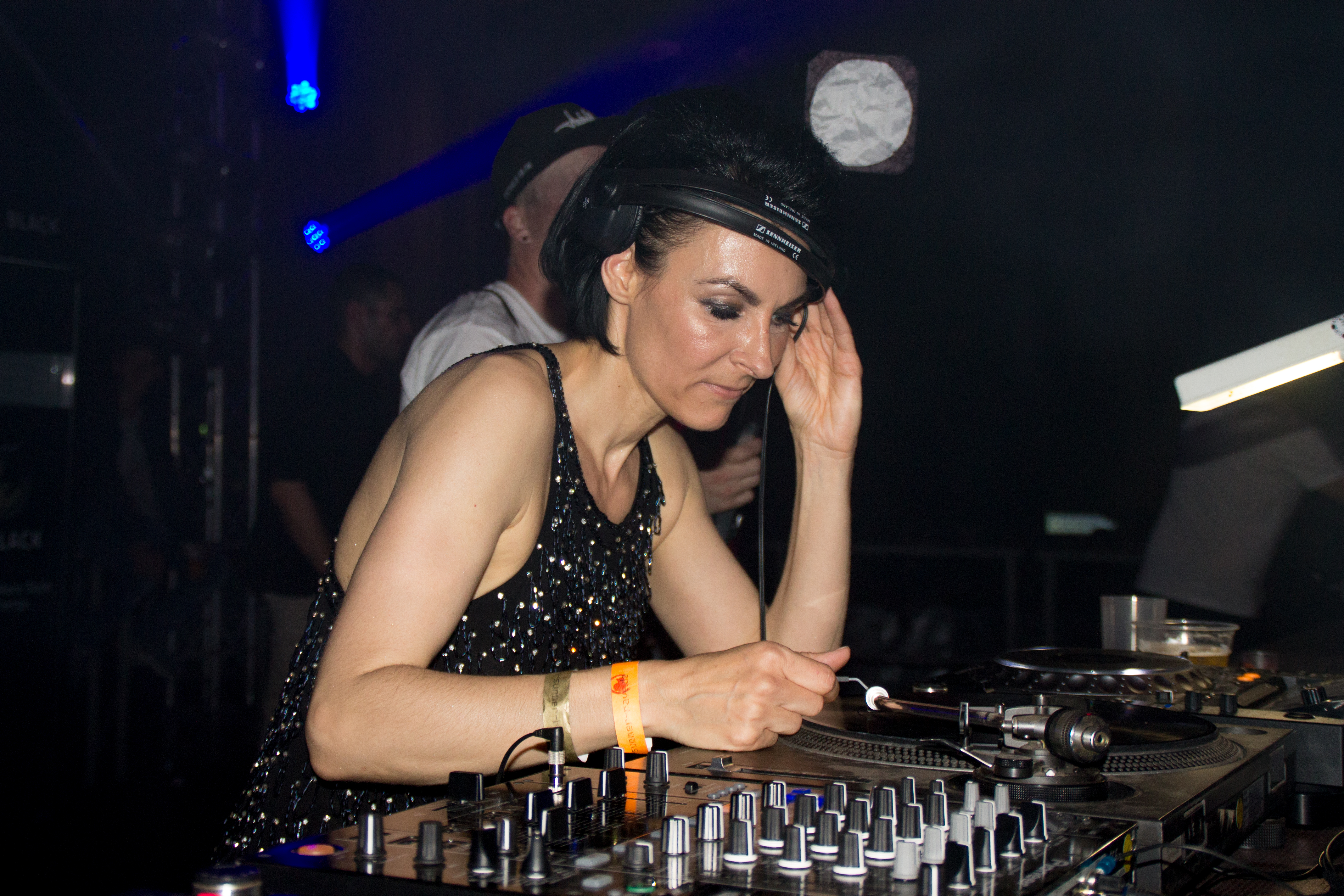 Marusha bei einem Live-DJ-Set auf dem Berlin Summer Rave 2015 am 13./14.06.2015 auf dem Ehemaligen Flughafen Tempelhof